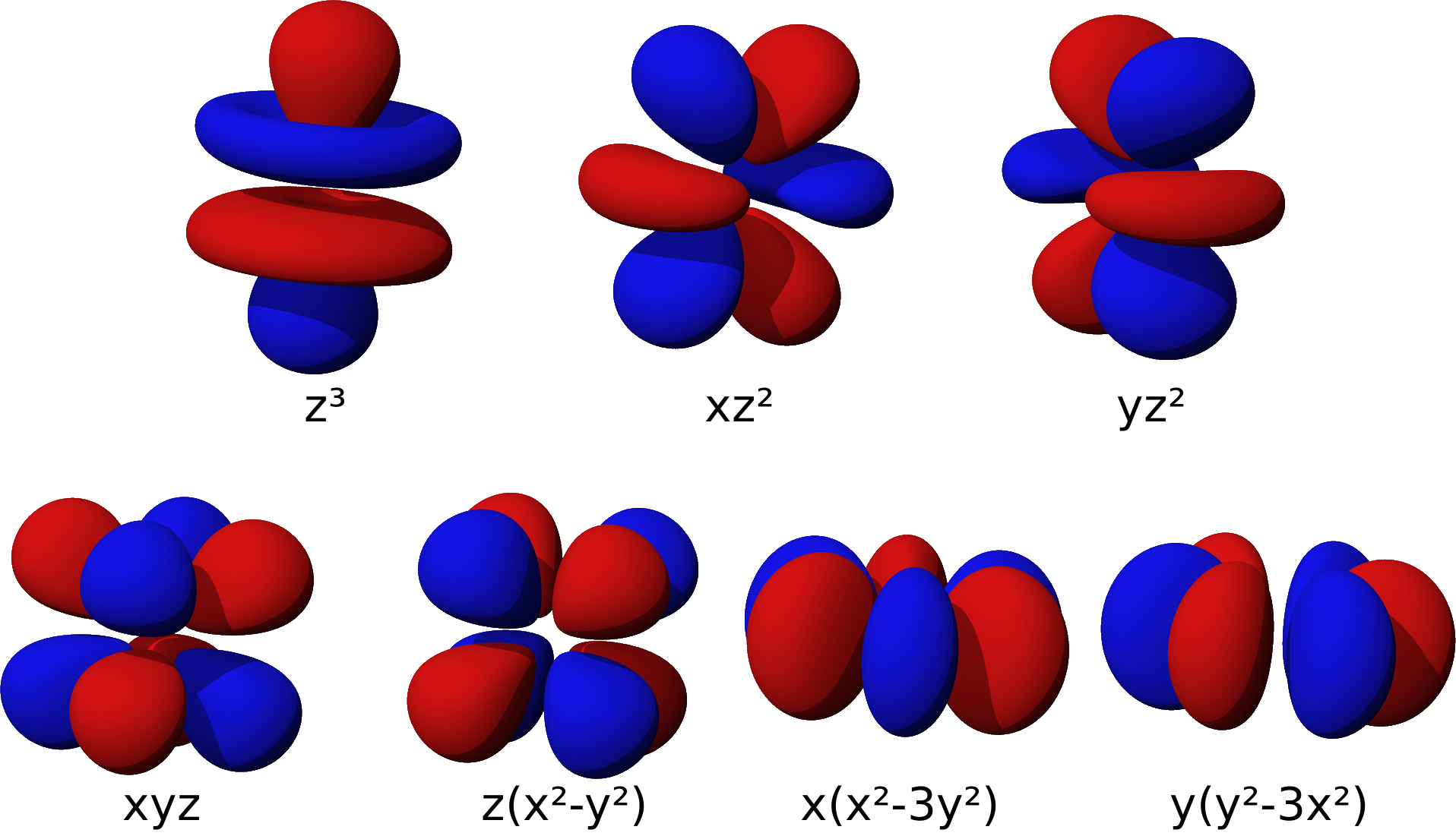 f軌域模型 用 Orbital viewer [1] 製作，再用PhotoImpact 合併